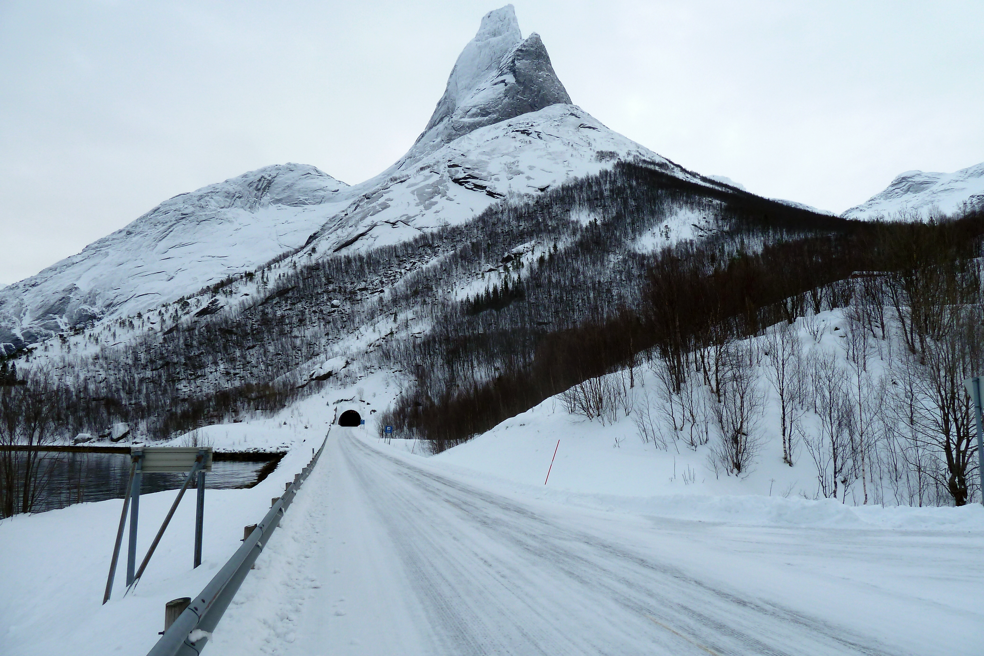 Stetindtunnelen på riksvei 827 i Nordland. Innslag mot Kjøpsvik (sørsiden/sørvestsiden). Fjellet Stetind.